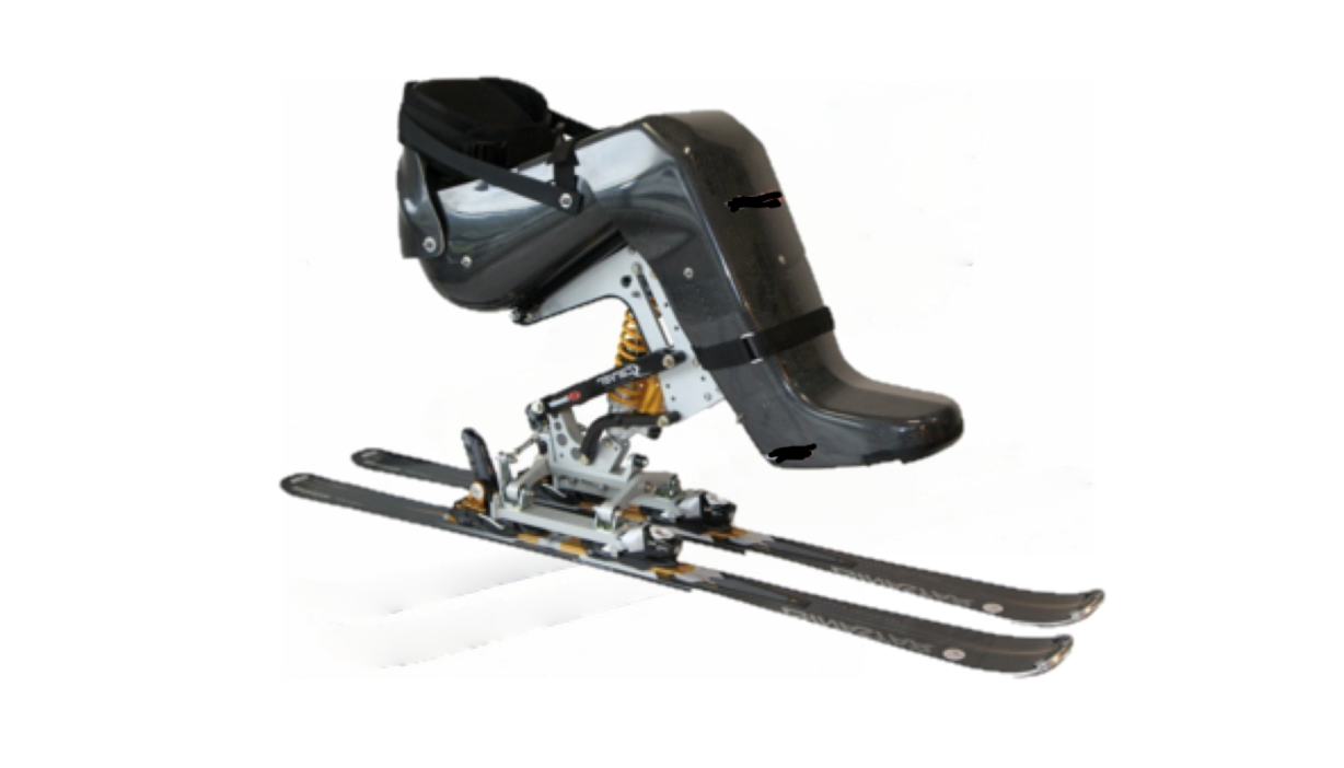 coque avec deux skis